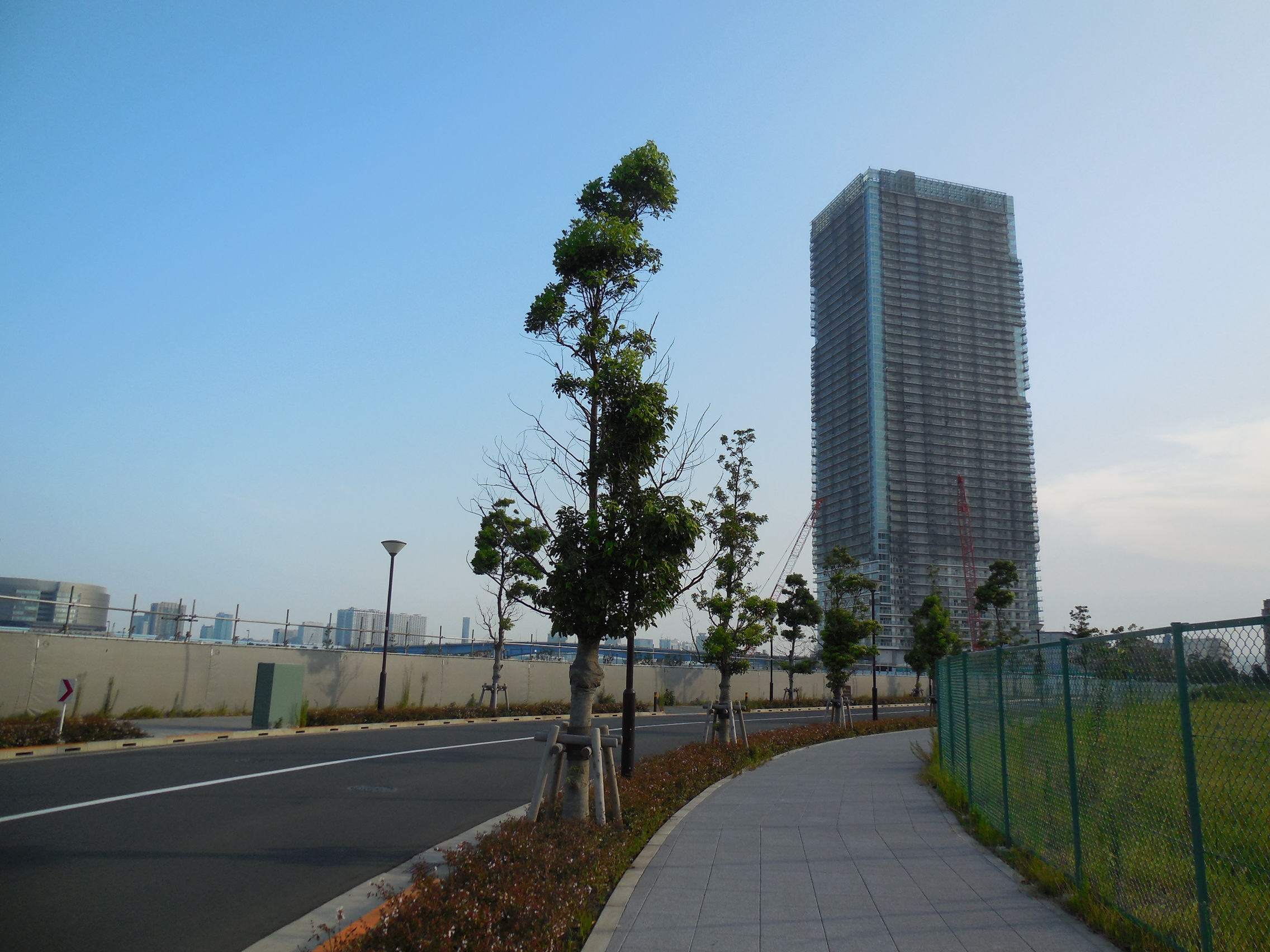 ザ・パークハウス晴海タワーズ クロノレジデンス